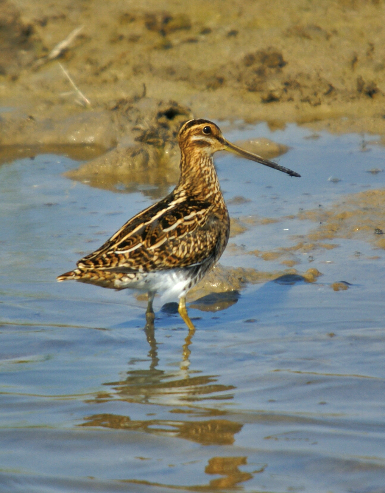 Gallinago gallinago, Viladecans, Barcelona, Catalonia, Spain